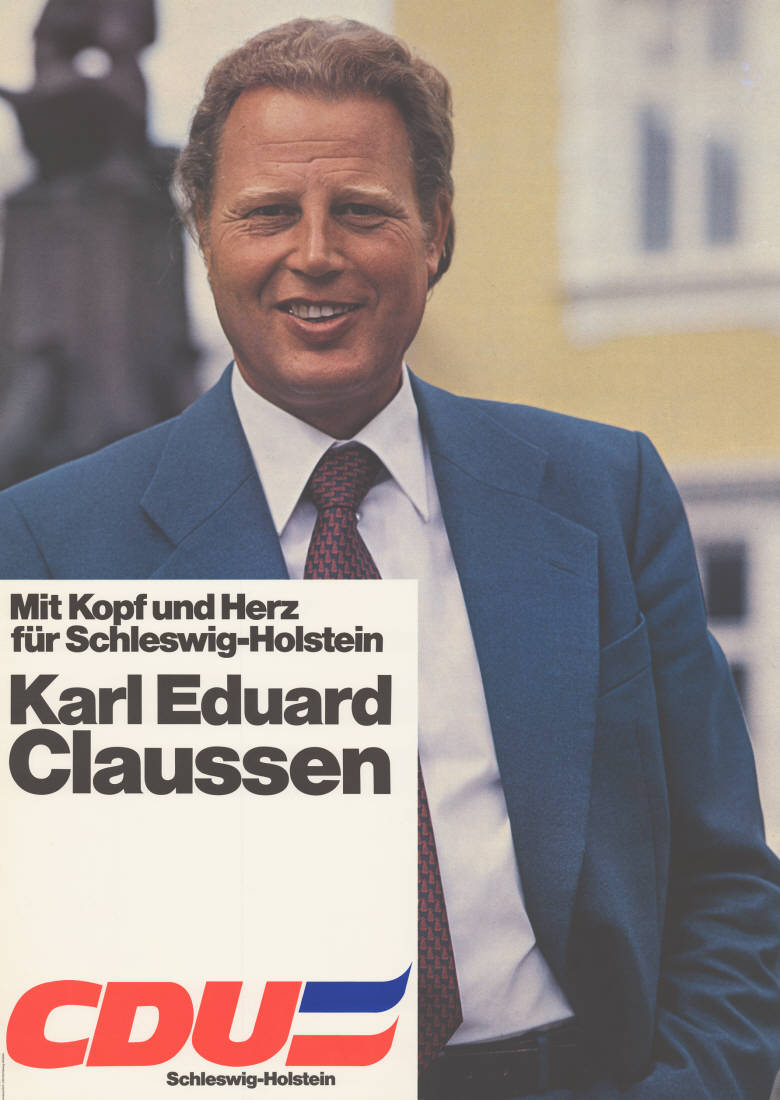 Mit Kopf und Herz für Schleswig-Holstein Karl Eduard Claussen CDU Schleswig-Holstein Abbildung: Foto Plakatart: Kandidaten-/Personenplakat mit Porträt Auftraggeber: Verantw.: CDU Schleswig-Holstein Objekt-Signatur: 10-012 : 410 Bestand: Landtagswahlplakate Schleswig-Holstein (10-012) GliederungBestand10-18: Landtagswahlplakate Schleswig-Holstein (10-012) » Landtagswahl am 29.4.1979 » Kandidatenplakate Lizenz: KAS/ACDP 10-012 : 410 CC-BY-SA 3.0 DE